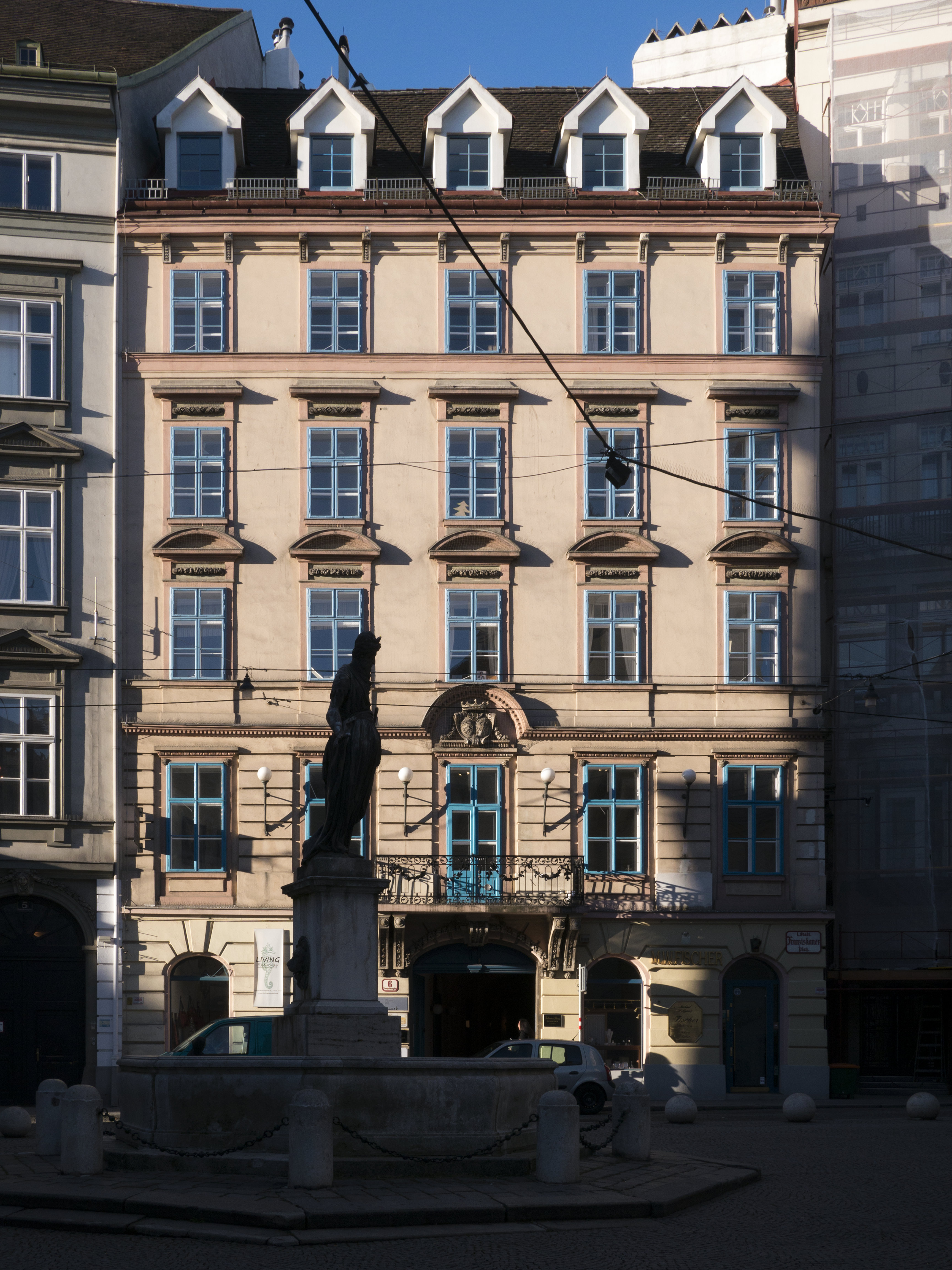 Haus Zum goldenen Löwen/Zum gelben, steinernen oder grünen Löwen, davor im Schatten der Mosesbrunnen.